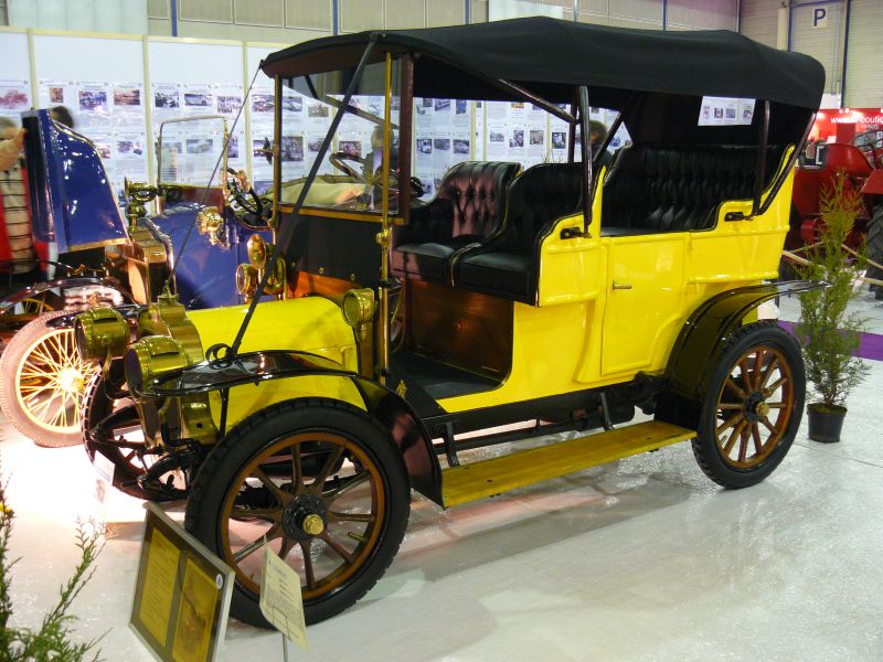 Reims 2012